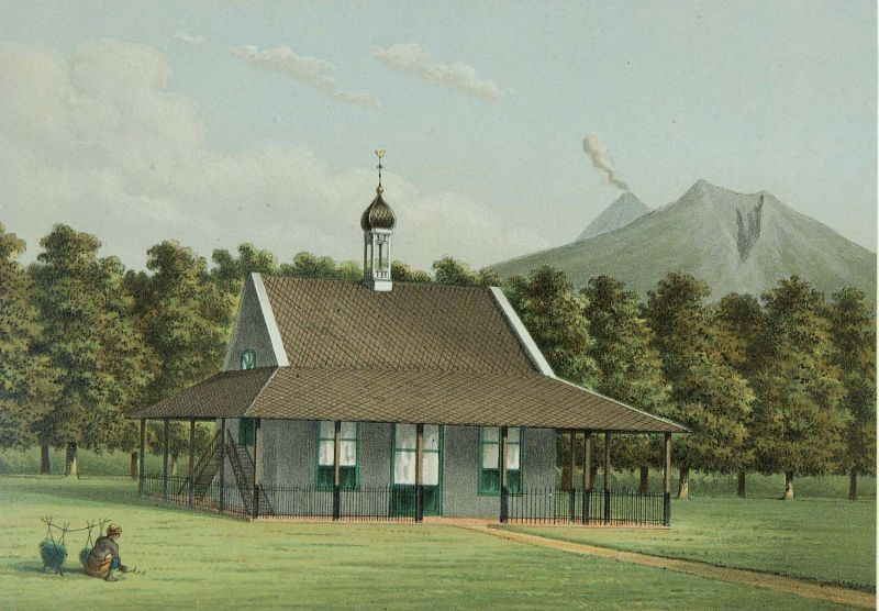 Litho. Kleurenlitho naar een oorspronkelijke aquarel van Rappard.. Een kerk in Salatiga